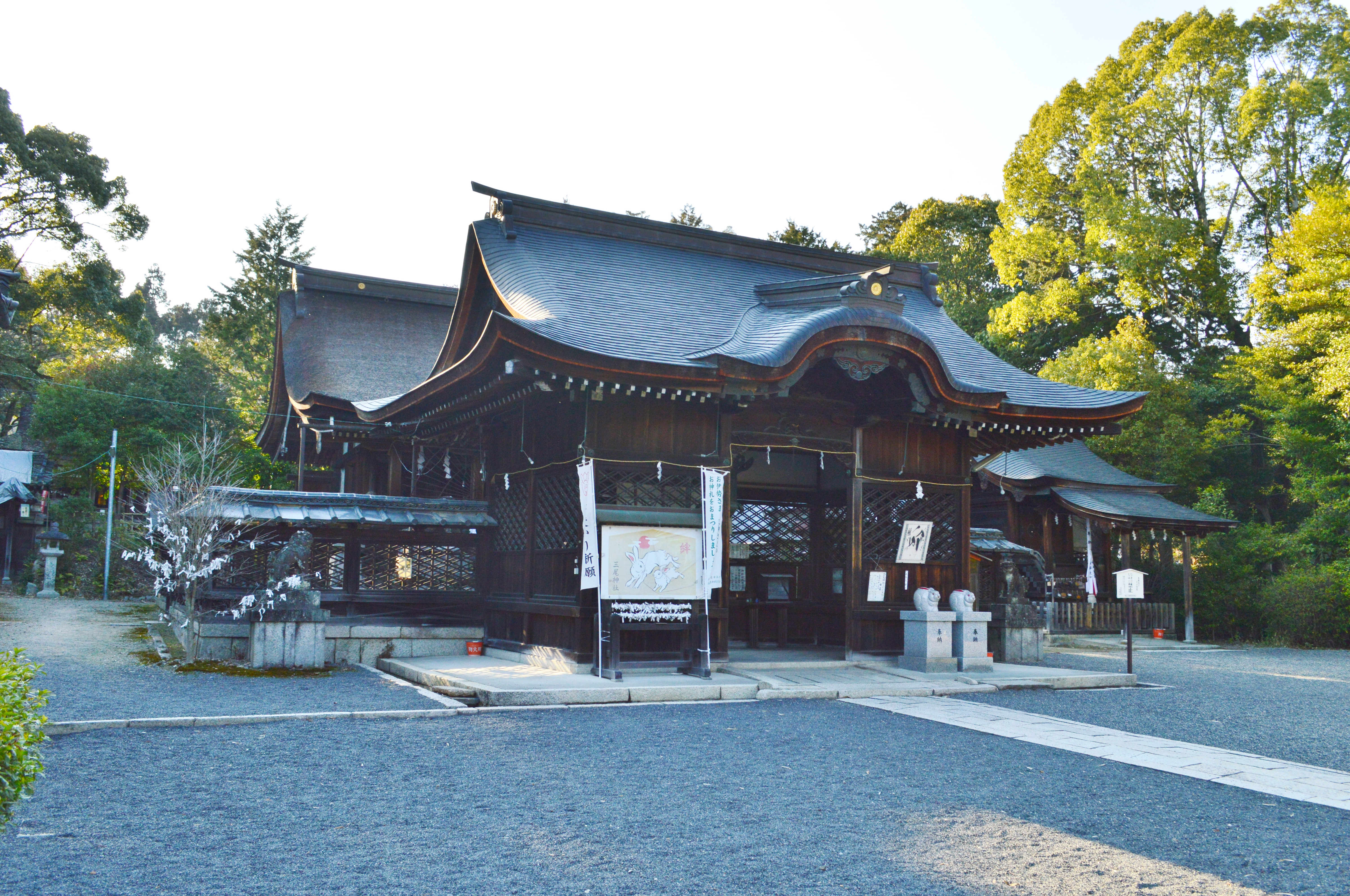 三尾神社 (大津市) 社殿